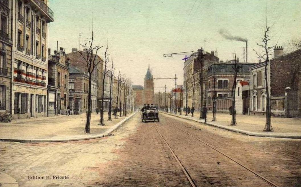 Boulevard de Châteaudun (actuel boulevard Jules Guesde) à Saint-Denis